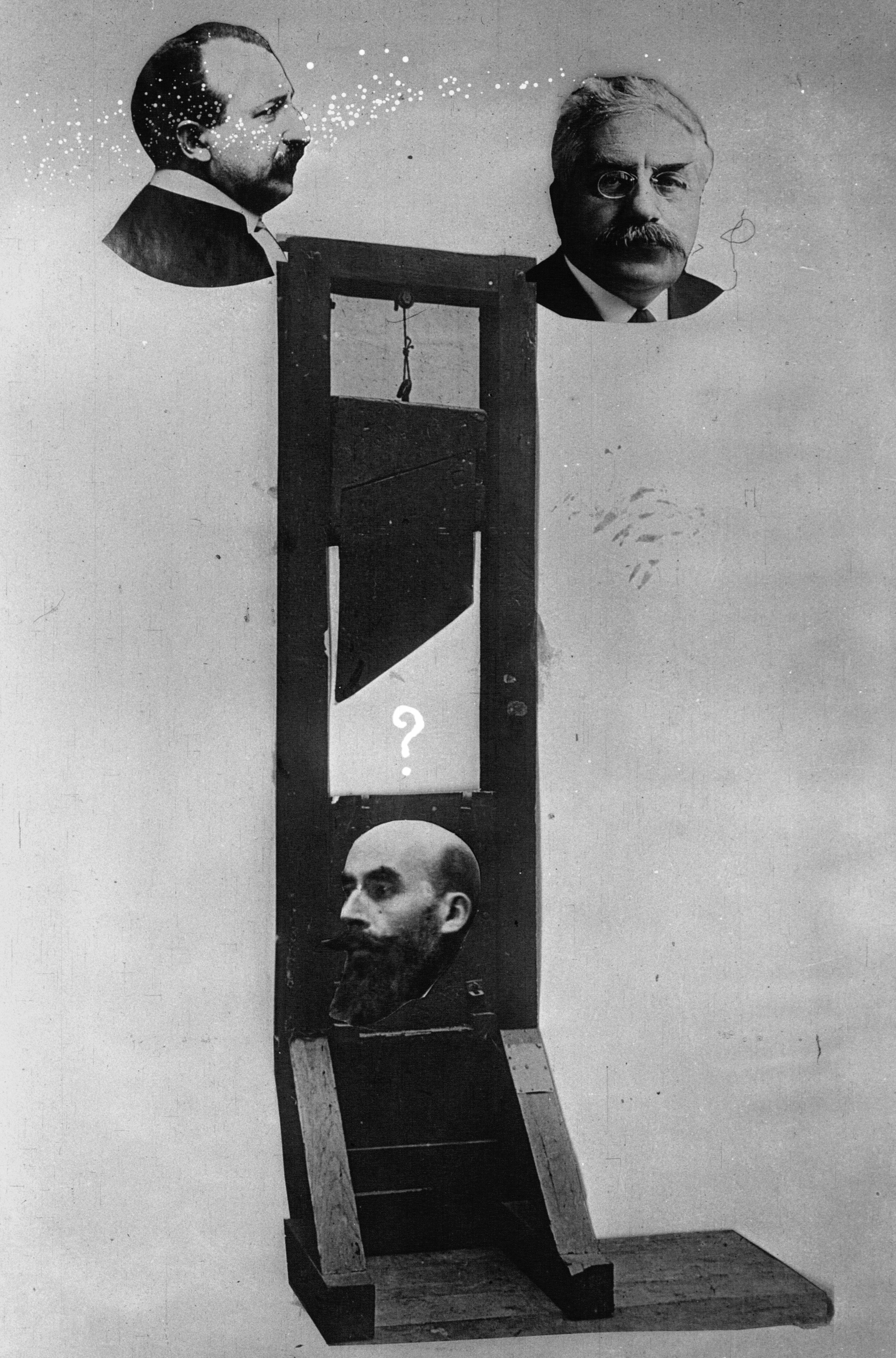 Composition représentant le criminel Henri Désiré Landru (sous la guillotine), son avocat Vincent de Moro-Giafferi (à gauche) et le président Alexandre Millerand (à droite), qui devait décider de lui accorder ou non sa grâce.